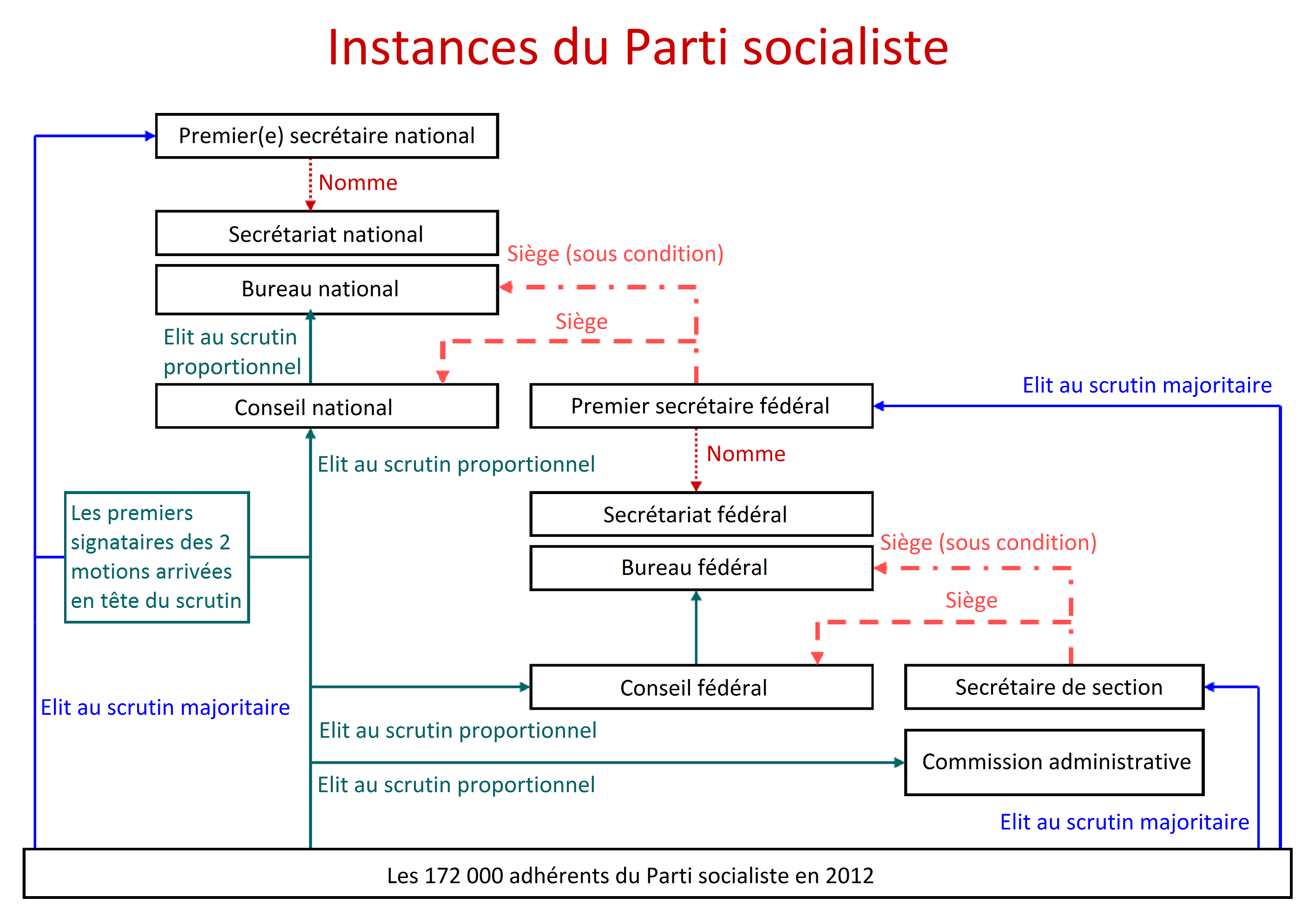 Organigramme des instances du PS de 2010 à aujourd'hui (2012)